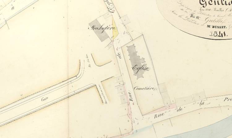 Carte représentant l'ancienne église de Genlis en 1841, 8 ans avant sa destruction